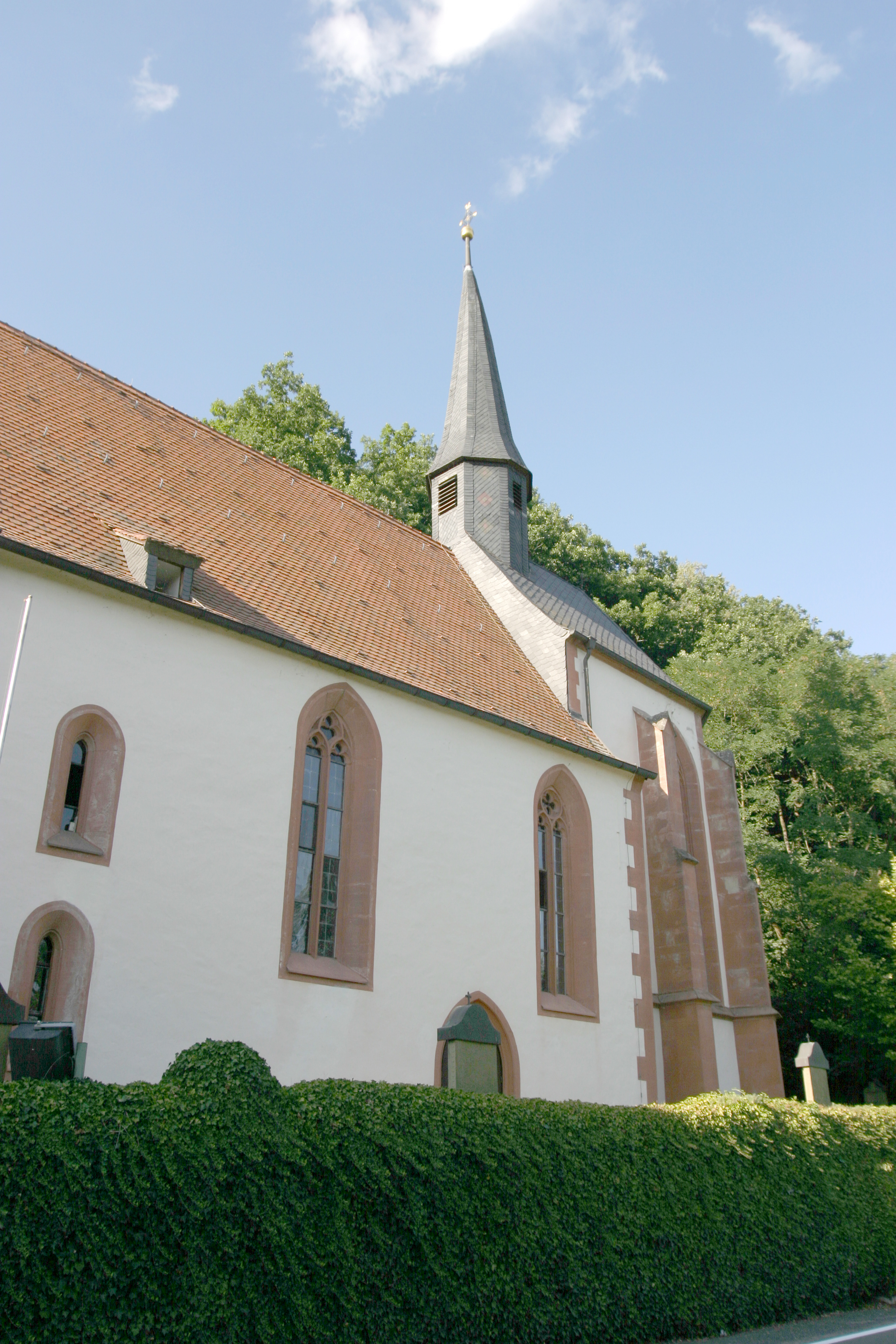 Maria-Schnee-Kirche in Unterebersbach, Gemeinde Niederlauer, Landkreis Rhön-Grabfeld, Regierungsbezirk Unterfranken, Bayern, Deutschland